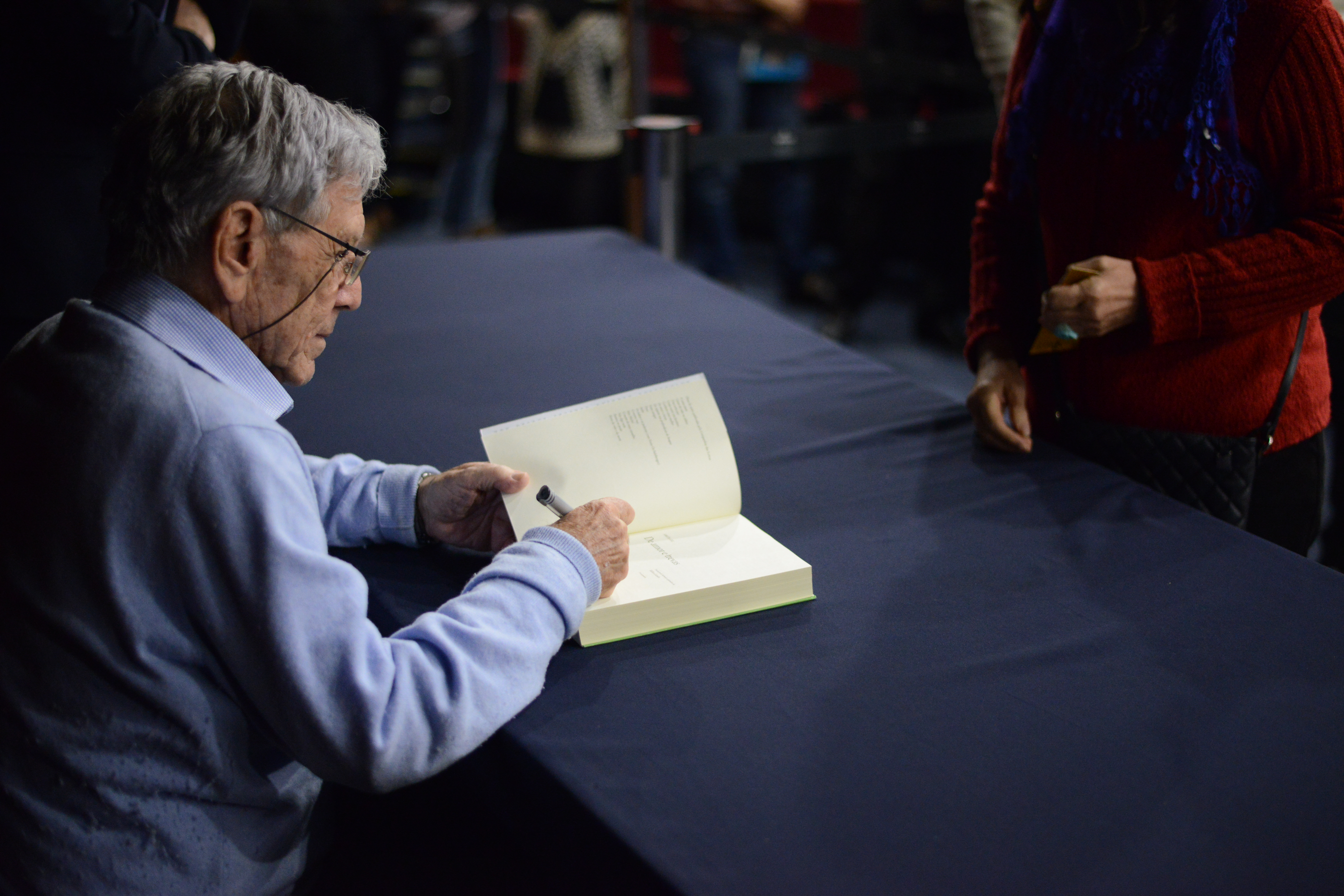 Convidados: Amós Oz, escritor israelense Data: 28 de junho de 2017 Local: Salão de Atos da UFRGS Crédito das imagens: Fronteiras do Pensamento / Luiz Munhoz